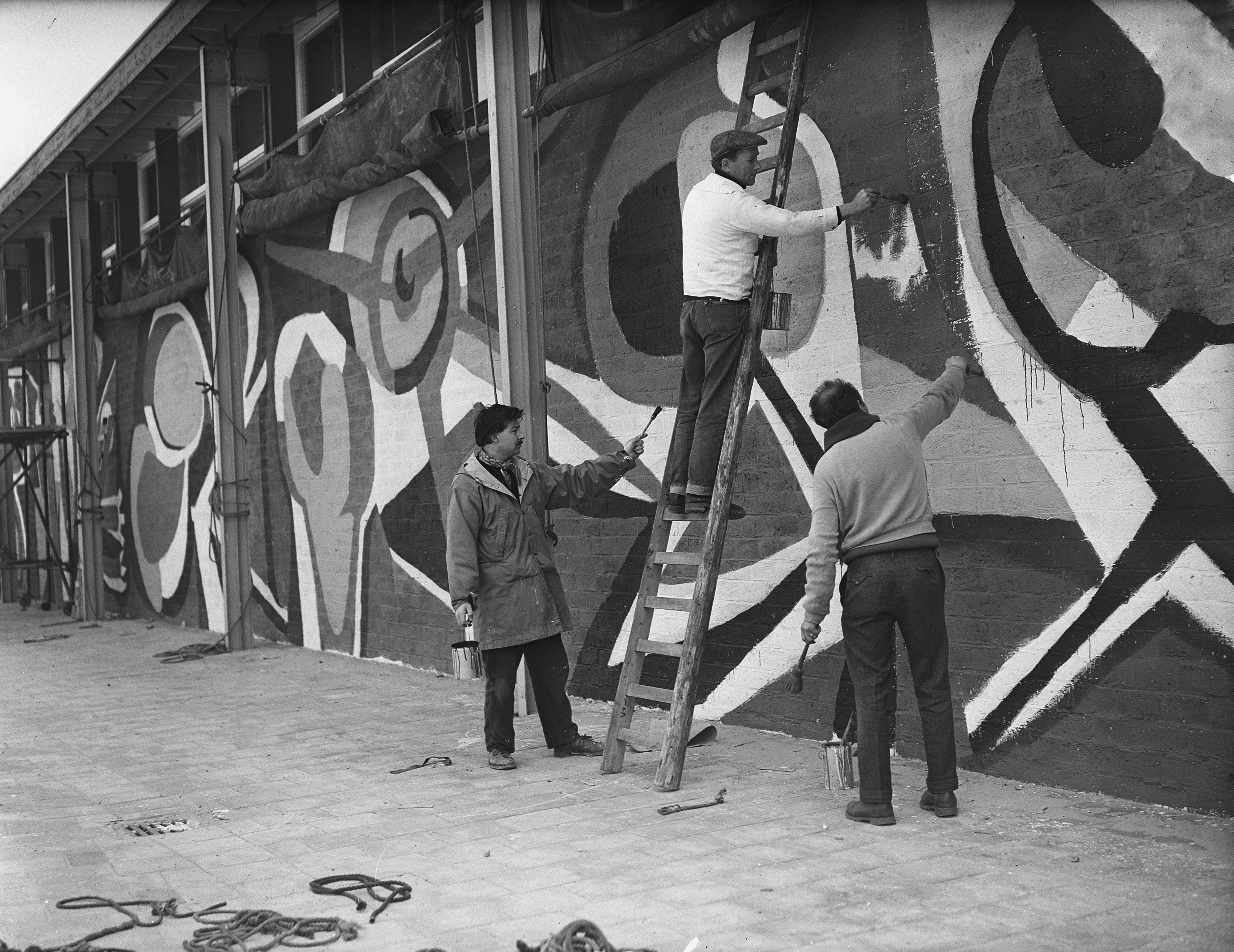 Collectie / Archief : Fotocollectie Anefo Reportage / Serie : [ onbekend ] Beschrijving : Aanbouw tentoonstelling E55 Rotterdam Datum : 19 april 1955 Locatie : Rotterdam, Zuid-Holland Trefwoorden : aanbouw, tentoonstellingen Fotograaf : Bilsen, Joop van / Anefo Auteursrechthebbende : Nationaal Archief Materiaalsoort : Glasnegatief Nummer archiefinventaris : bekijk toegang 2.24.01.09 Bestanddeelnummer : 907-0826 Reacties Geplaatst door Maaike op 28 oktober 2013 - 16:35. Opbouw tentoonstelling Nationale Energie Manifestatie E-55 op het terrein van ca. 37 ha. groot Instellingsnamen / Persoonsnamen: Nationale Energie Manifestatie E-55 Geplaatst door Kunstliefhebber op 13 januari 2016 - 23:13. Schilder Karel Appel brengt een muurschildering aan op het expositiegebouw. Persoonsnamen: Appel, Karel